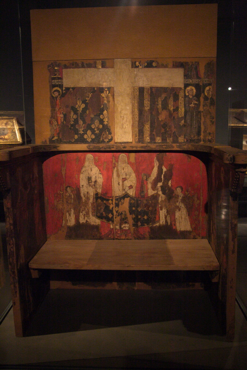 Tron de Blanca d'Aragó i Anjou Monestir de Sixena s. XIV